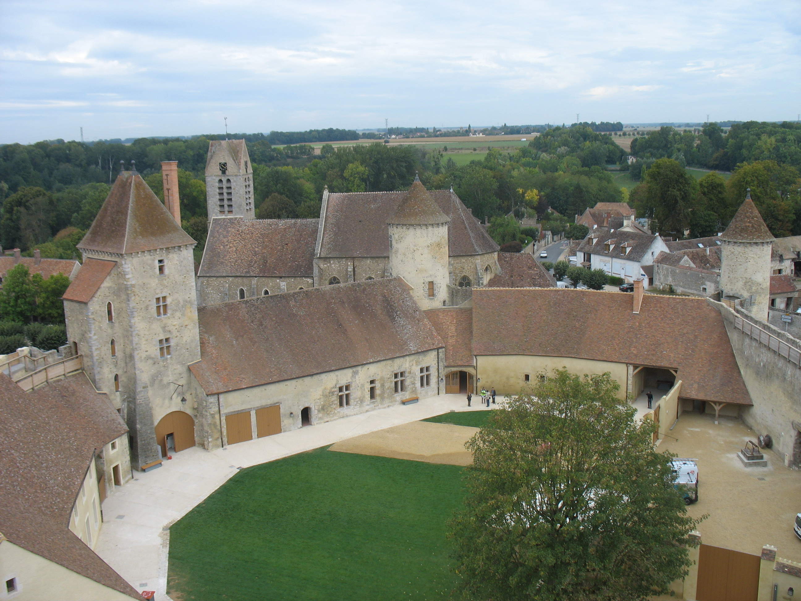 Vue de la cour intérieur du château de Blandy-les-Tours depuis le donjon